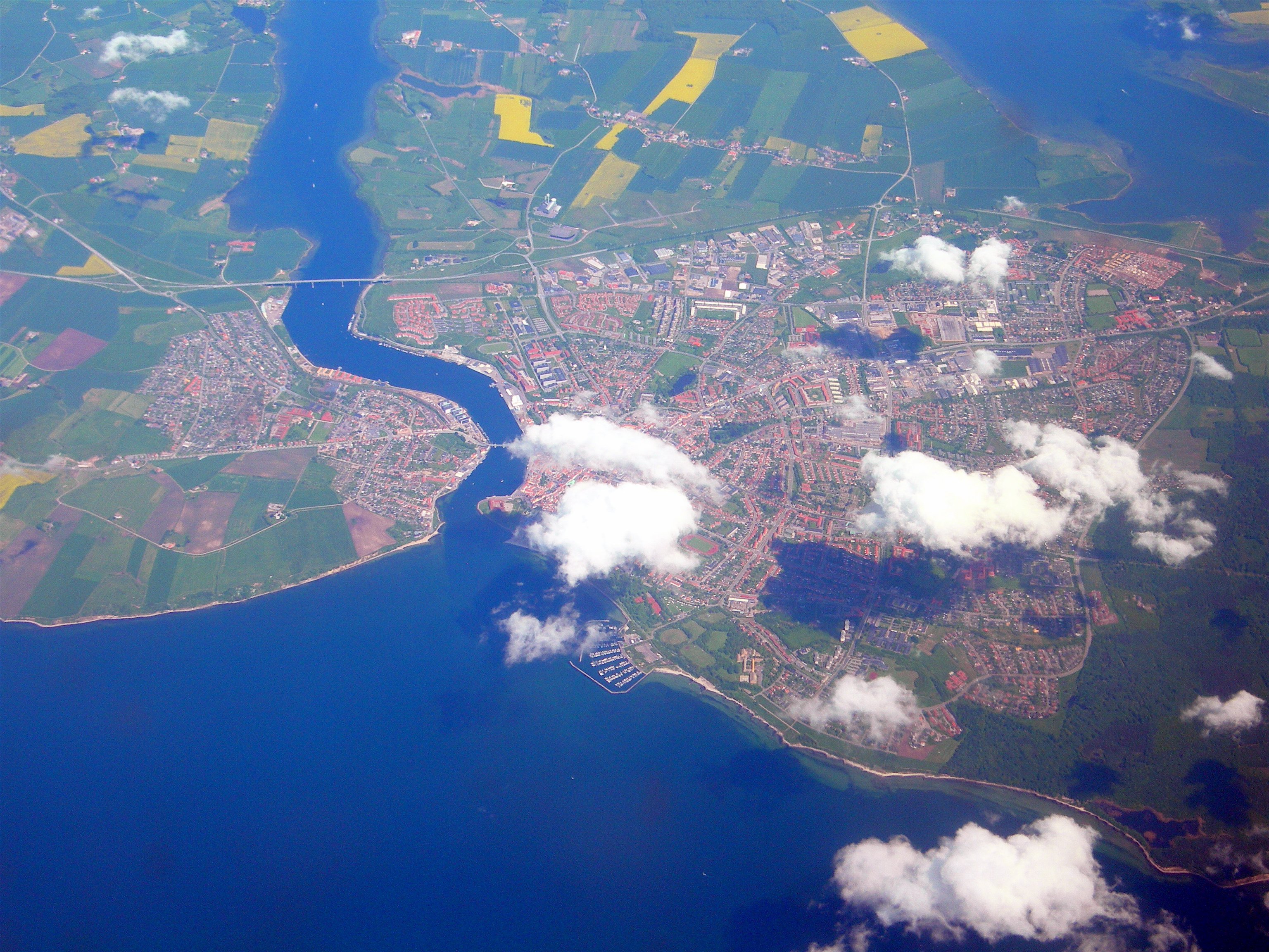 Sønderborg fra oven. Nord er øverst. Sønderborg from above, top is north.